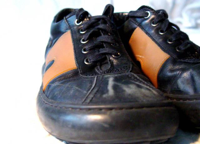 Campers